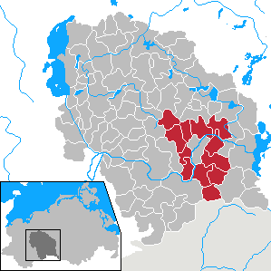 Amt Ture in Mecklenburg-Vorpommern - District Parchim